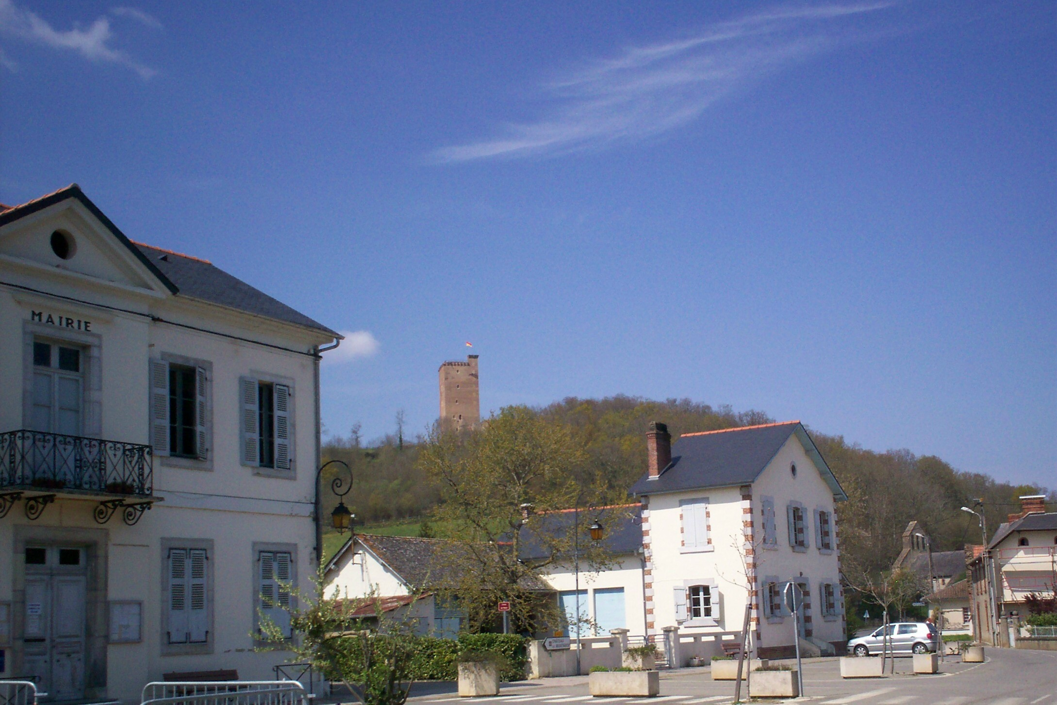 Montanèr, au pè deu casteth